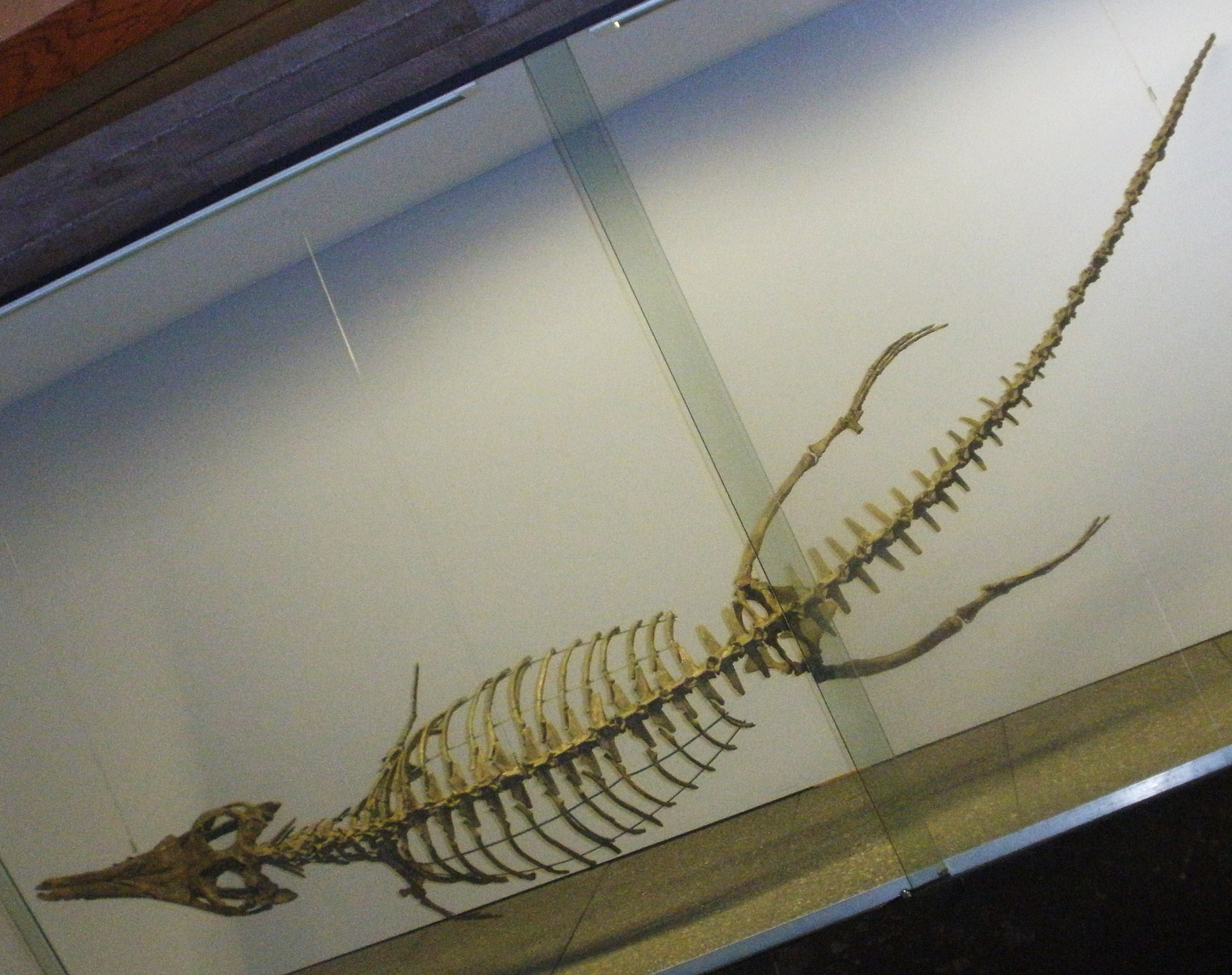 Fossil of Metriorhynchus, an extinct crocodile- Took the photo at Senckenberg Museum of Frankfurt